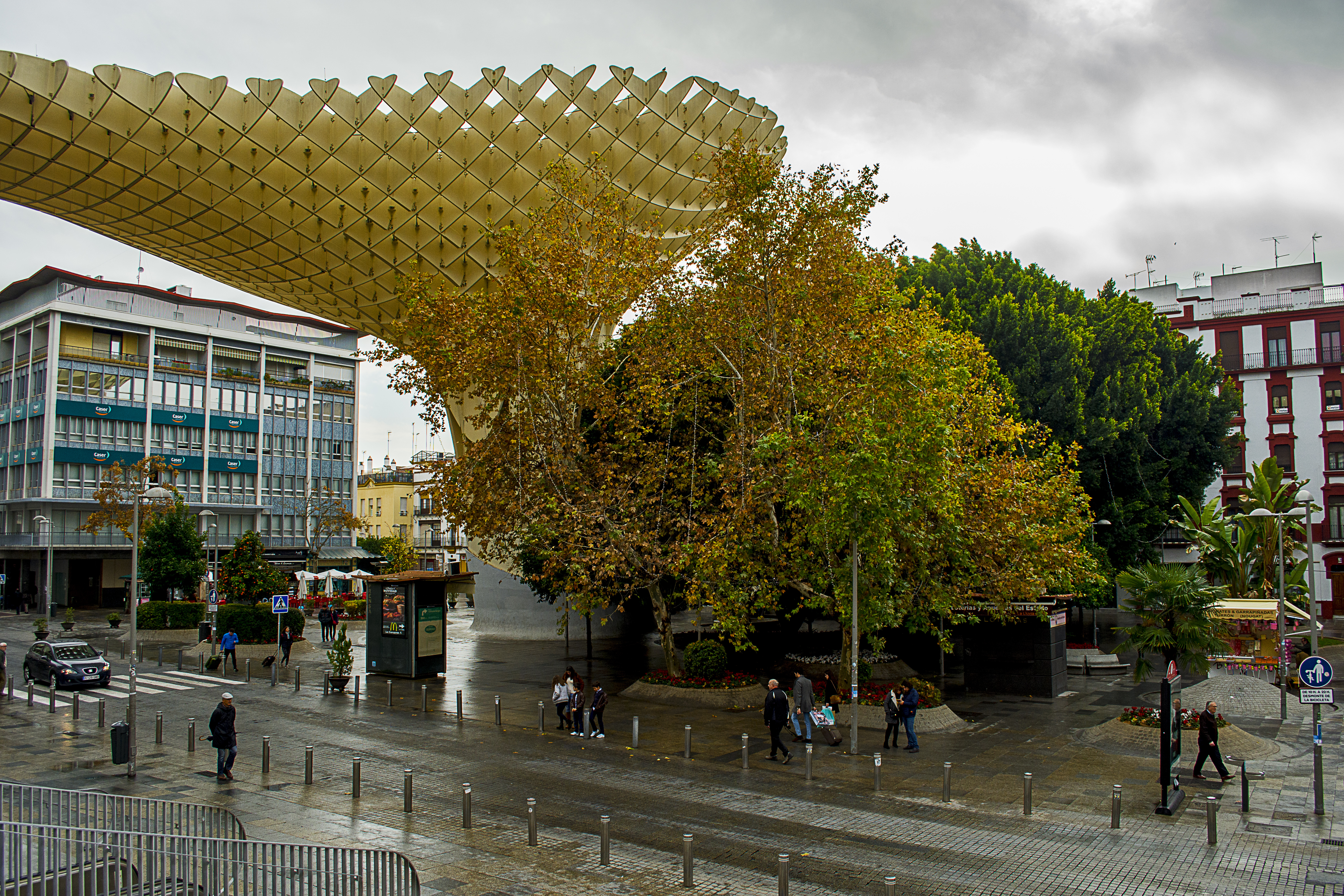 Plaza de la Encarnación y Metropol Parasol. (Sevilla)